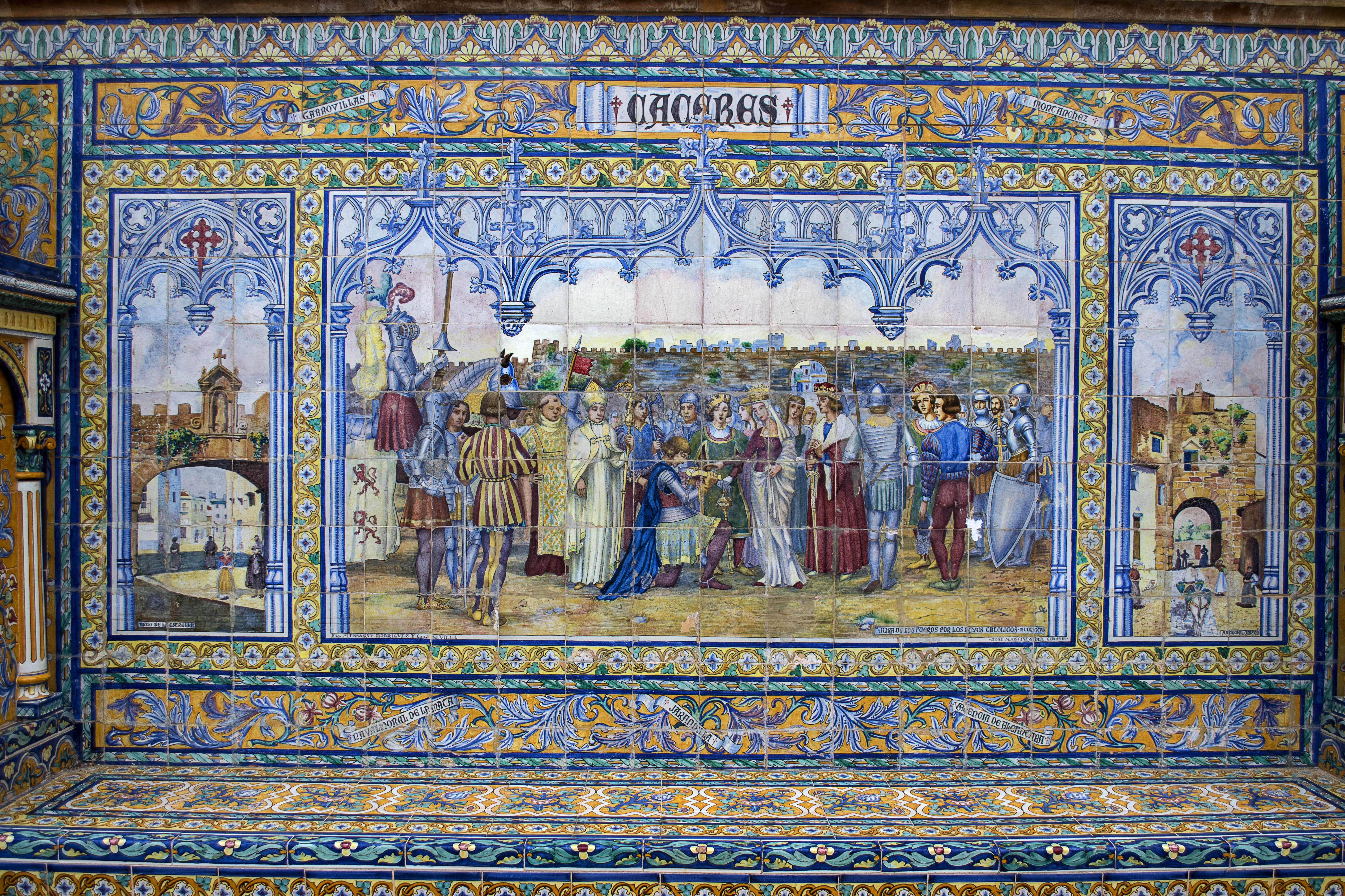 Plaza de España de Sevilla, azulejo correspondiente a la provincia de Cáceres. Fue realizado por la fábrica de Mensaque Rodríguez y Cía y la pintura corresponde al artista sevillano José Martínez del Cid. El motivo central representa el “Juramento de los fueros de Cáceres” es el original.